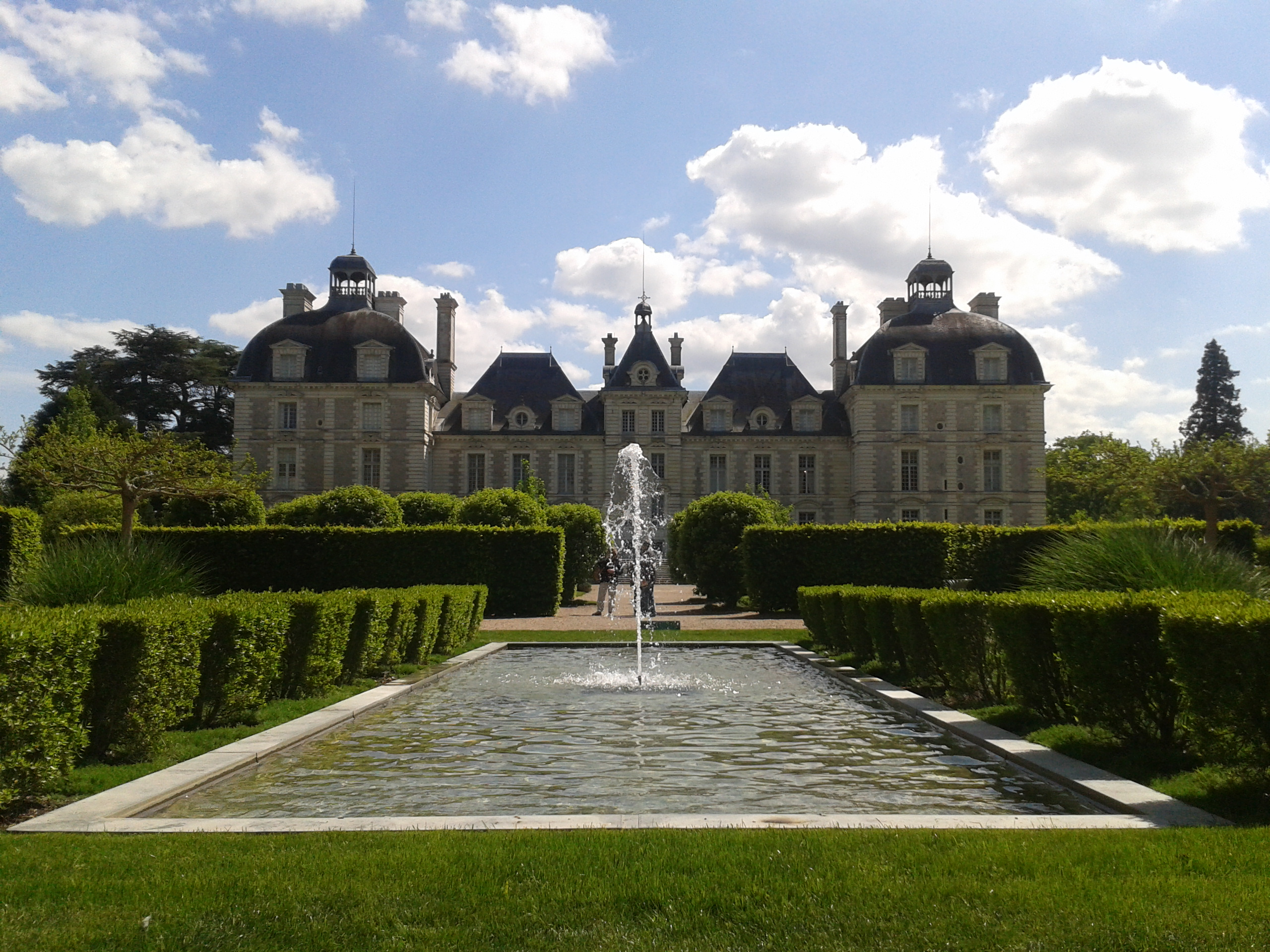 Château de Cheverny depuis les jardins.